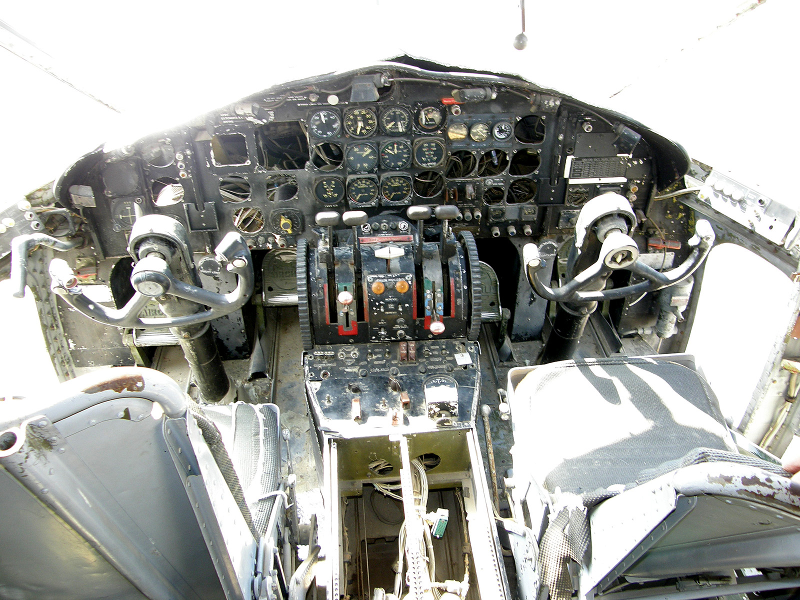 C-119C instrument panel